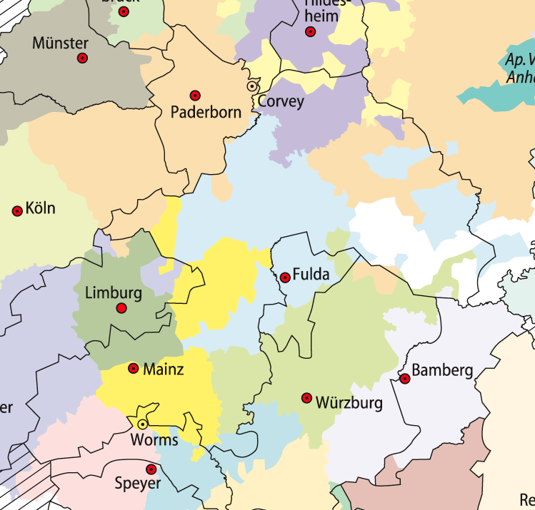 Karte der Erzdiözese Mainz vor 1821 (schwarze Grenzlinie) und des Bistums Mainz nach 1821 (gelbe Fläche; Provida solersque)